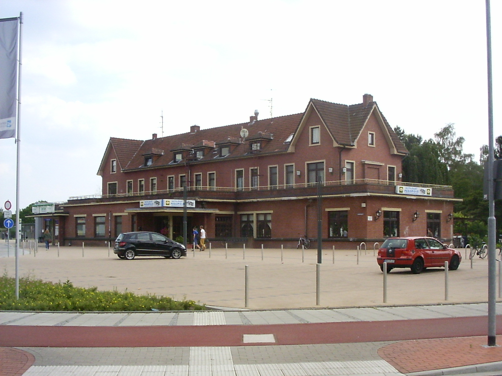 Station Nordhorn vanaf het plein